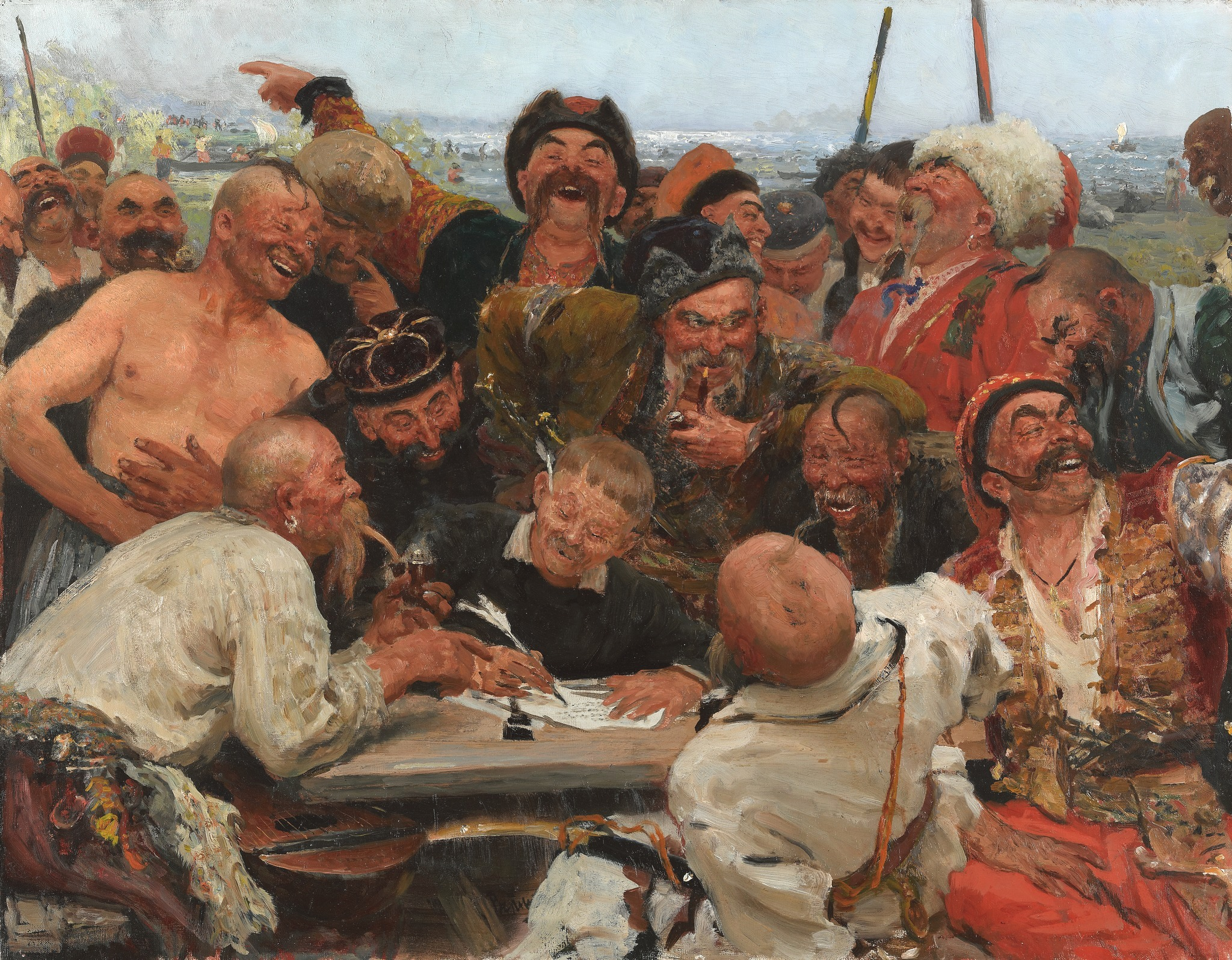 Sketch.